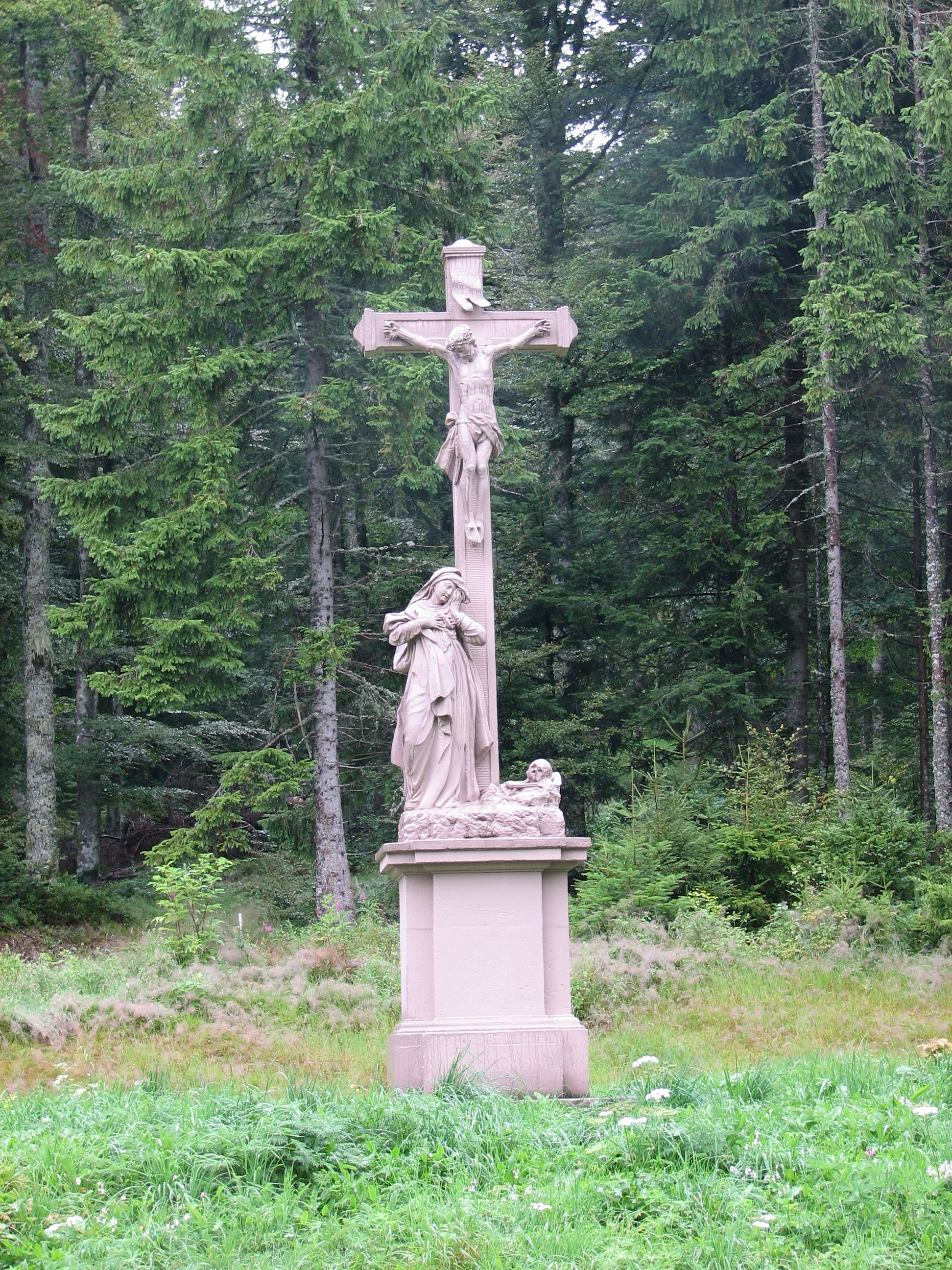 Ibacher Kreuz am Schluchtensteig